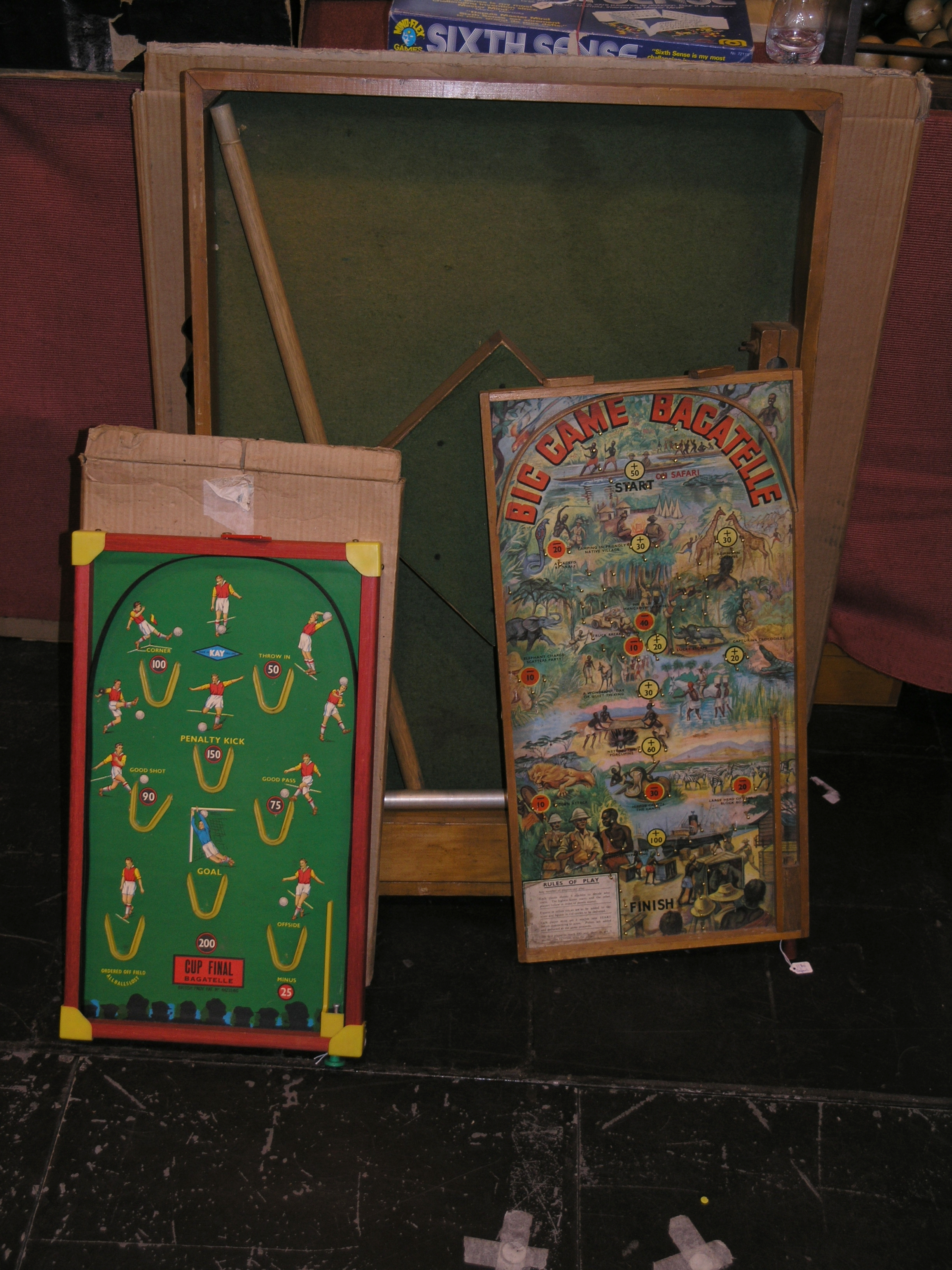 Herní festival Essen SPIEL 2007 - Bagatelle